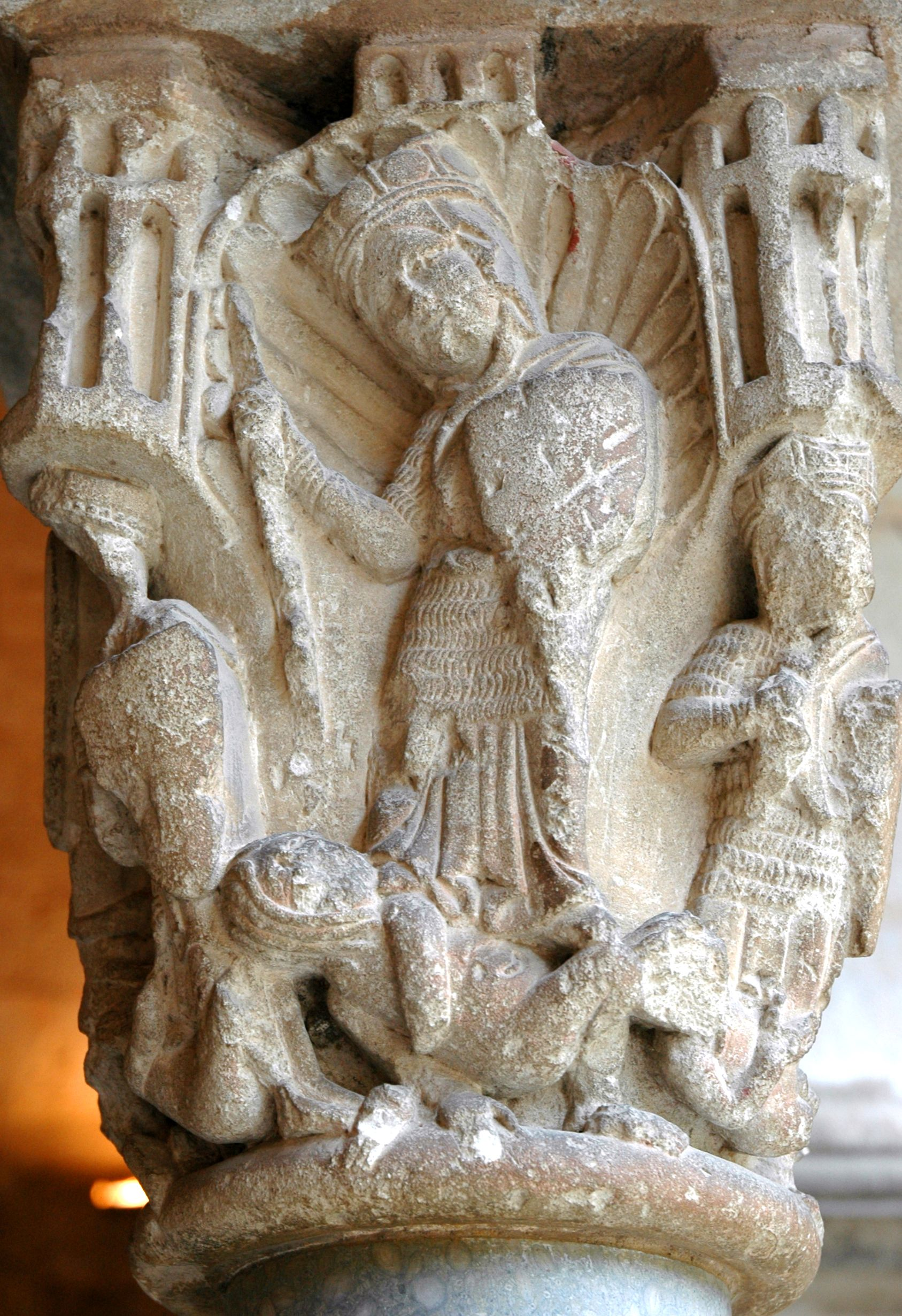 Monestir de Sant Cugat - Capitell S-35-I . Psicomàquia o triomf de les virtuts sobre els vicis. El triomf de les virtuts es representa amb set figures femenines coronades, vestides amb cota de malla, proveïdes d'escuts i espases, esclafant unes petites figues nues que representen els vicis. La cota de malla és simbòlicament la defensa espiritual de les set virtuts. En una cara hi ha una vuitena figura vestida segons l'època i sense armes, sosté un llibre per simbolitzar el valor de les virtuts.